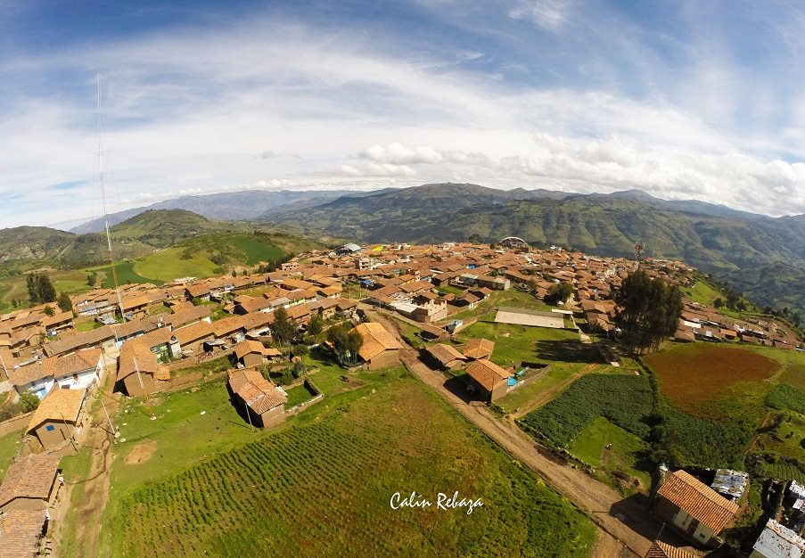 La ciudad de Julcan el La Libertdad Perú